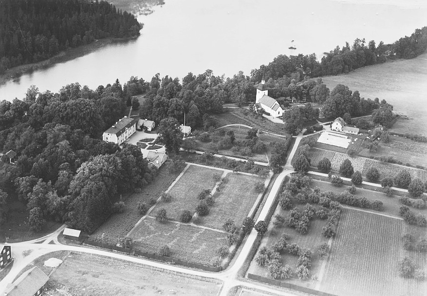 Flygfoto över Tvetabergs gård med Tveta kyrka i bakgrunden